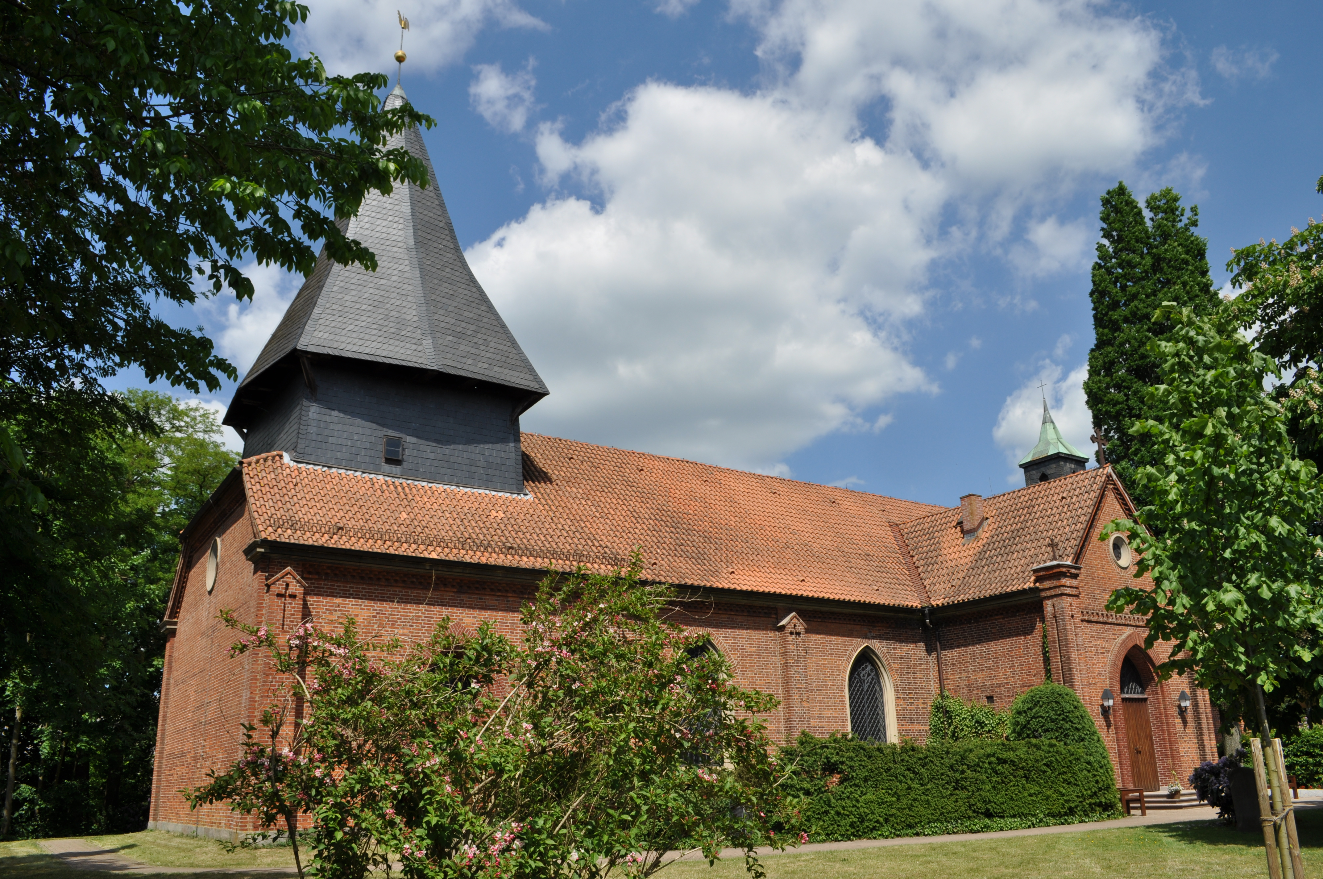 Blick von Südwesten auf die Kirche von Leezen (Holstein). This is a photograph of an architectural monument. .1